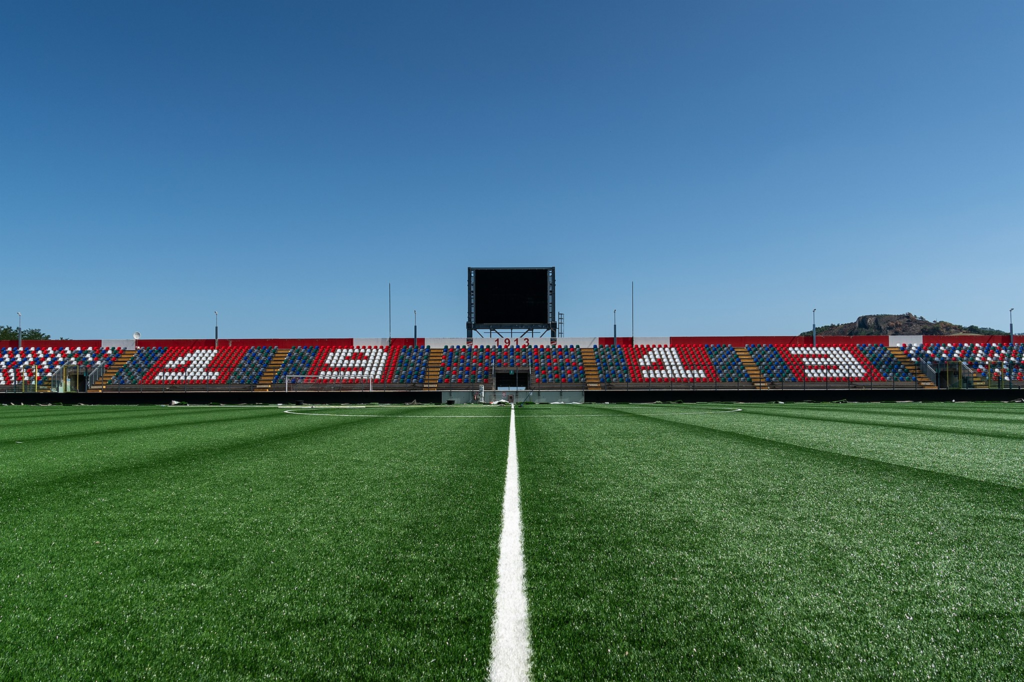 Stadio